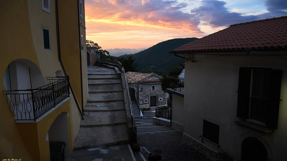 Acquafondata